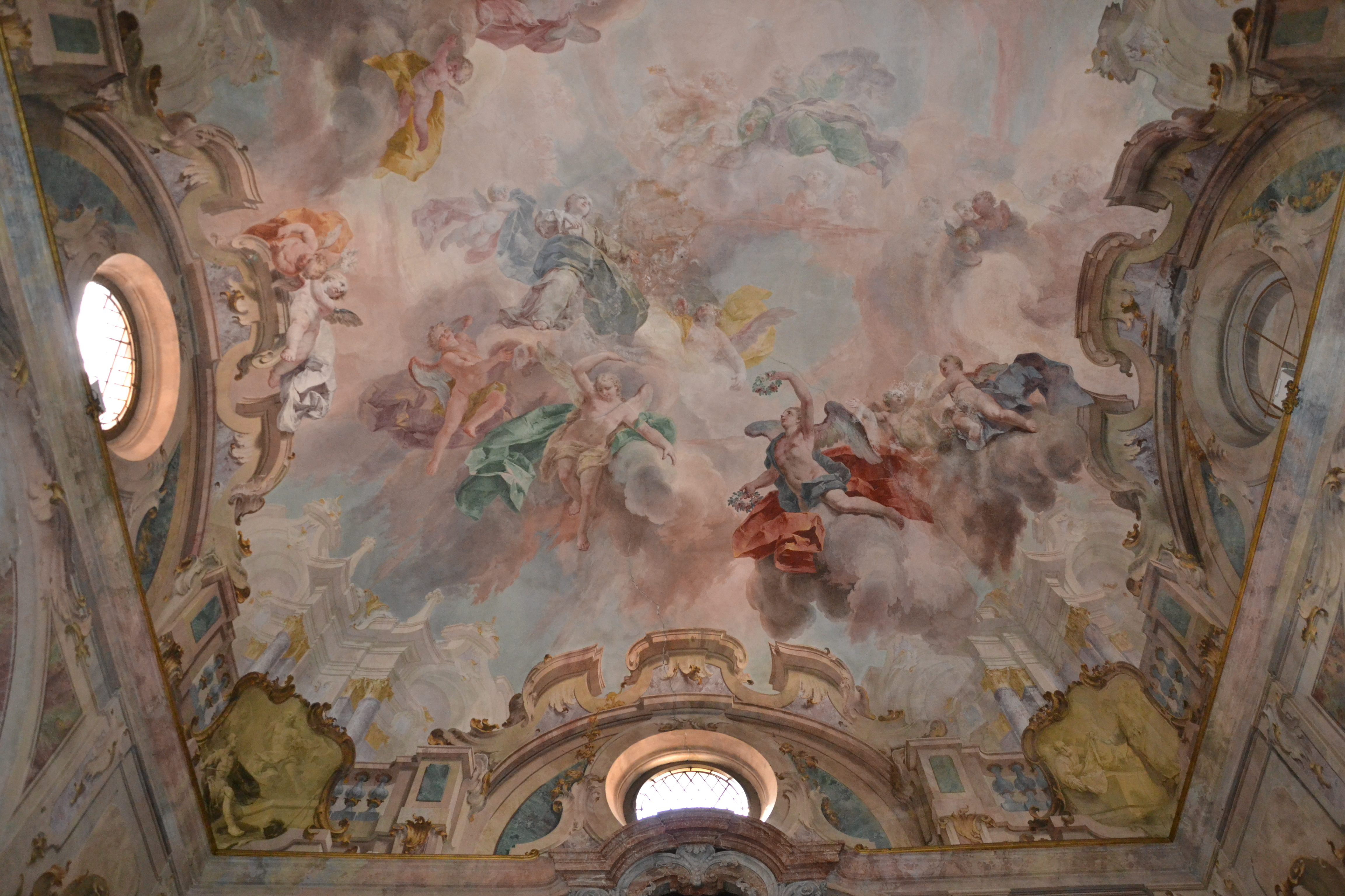 Cappella del Rosario, affeschi di Biagio Bellotti, 1765-1766, Milano, Certosa di Garegnano